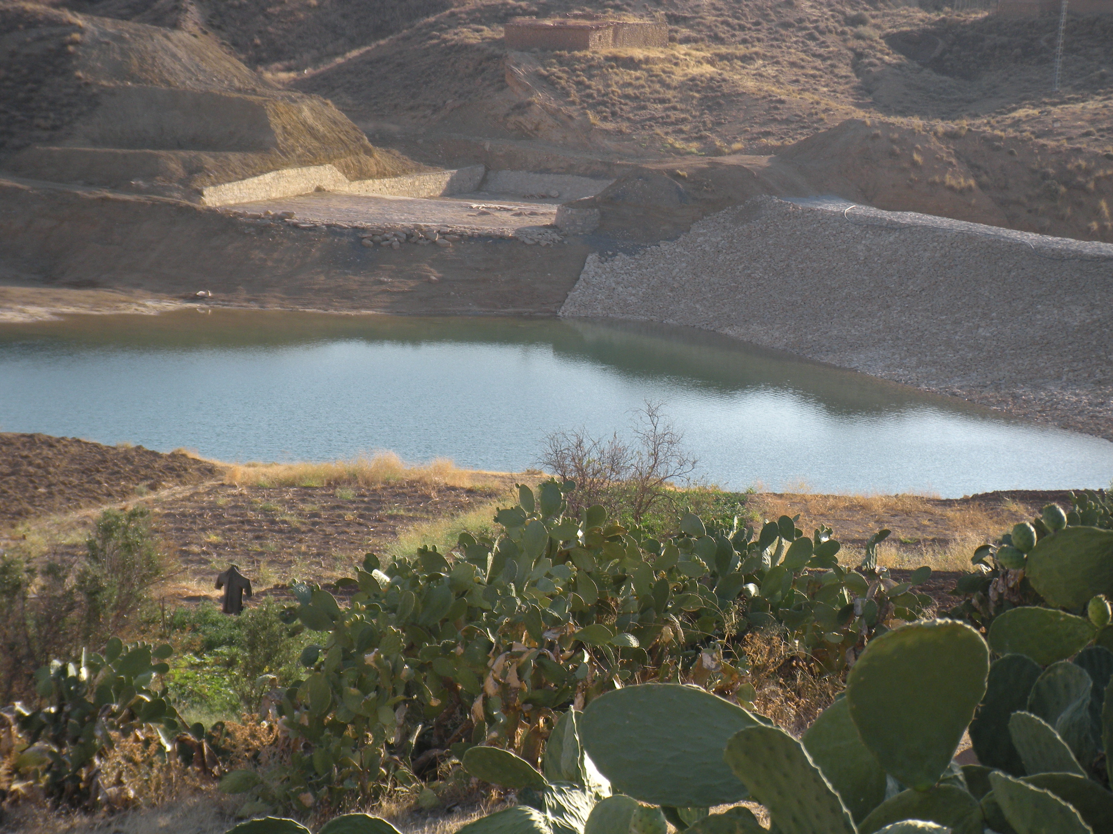 Barrage de Maafa dans les Aurès en Algérie